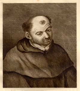 Jacopo Passavanti, stampa antica del XVIII secolo